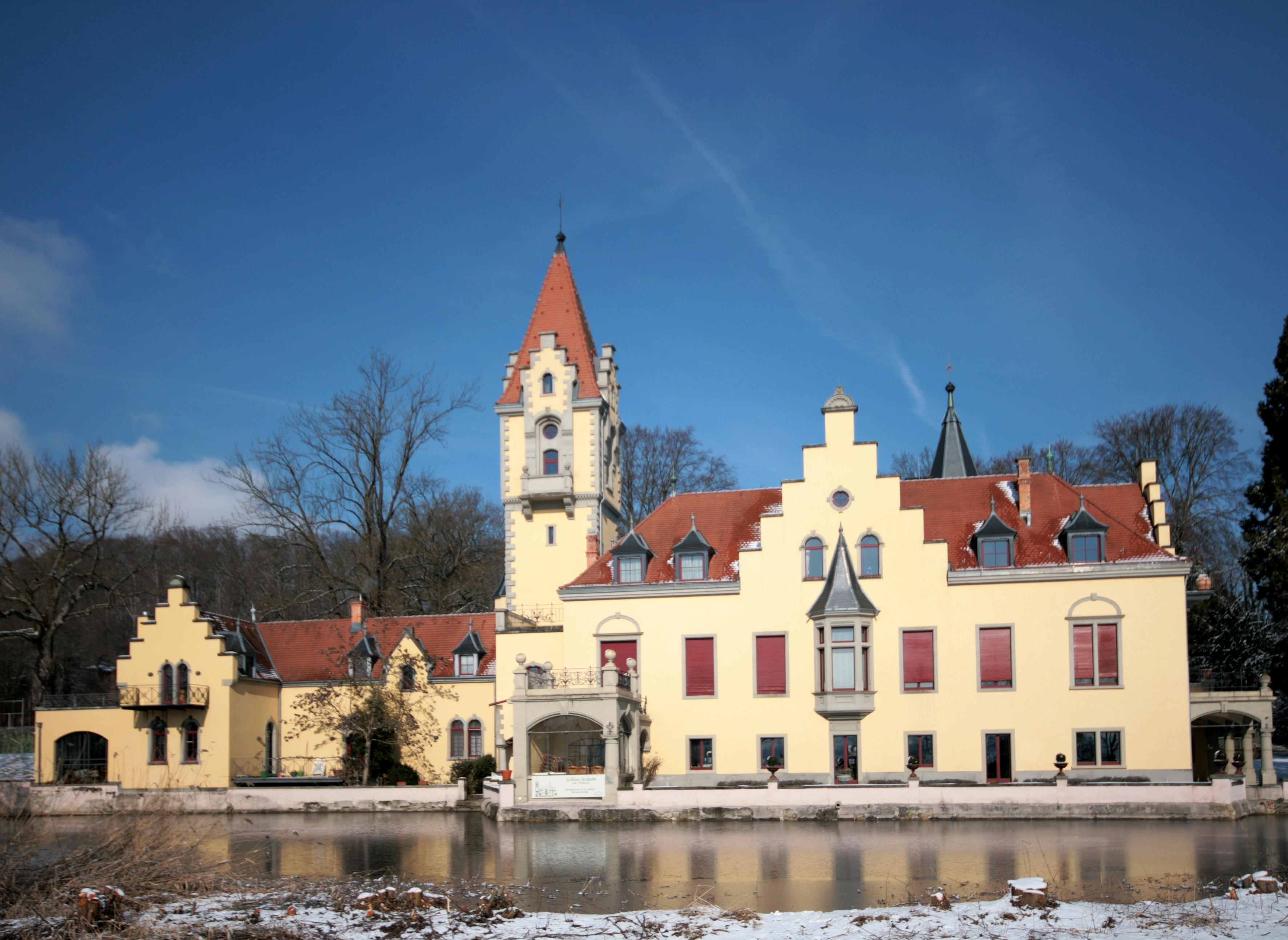 Restaurant "Schloß Seeheim" in Konstanz am Bodensee, zwischen Therme und Strandbad Horn.